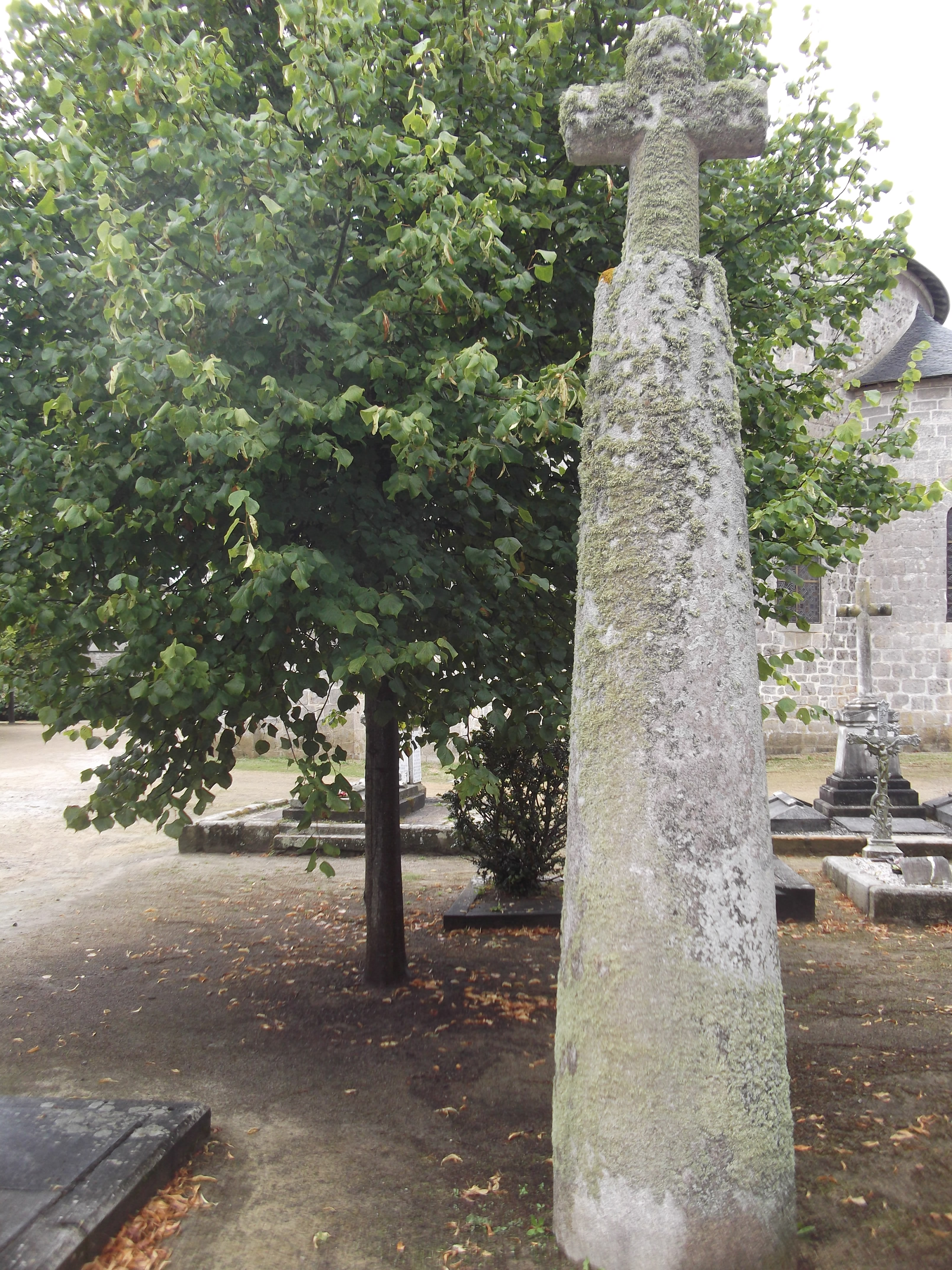 Stèle tronconique cannelée (Ier millénaire avant J.C.) ; granite